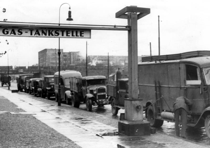 Berlin, Gas-Tankstelle ADN-ZB/Blunck 30.10.1948 Berlin, Gaswerk Dimitroffstraße Nach der vollendeten Reparatur des Gaswerks am 29.10.1948 herrscht an der Gas-Tankstelle wieder Hochbetrieb. Täglich werden hier bis zu 150 Wagen getankt. Eine Flasche, das entspricht 5-6 Liter Benzin, kostet 2.-M. 2363-48